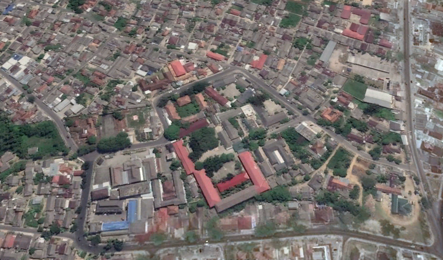 ss